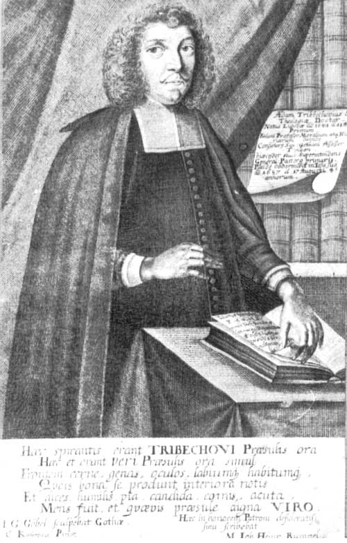 Adam Tribbechow, (1641-1687) deutscher evangelischer Theologe, Historiker und Ethnologe.